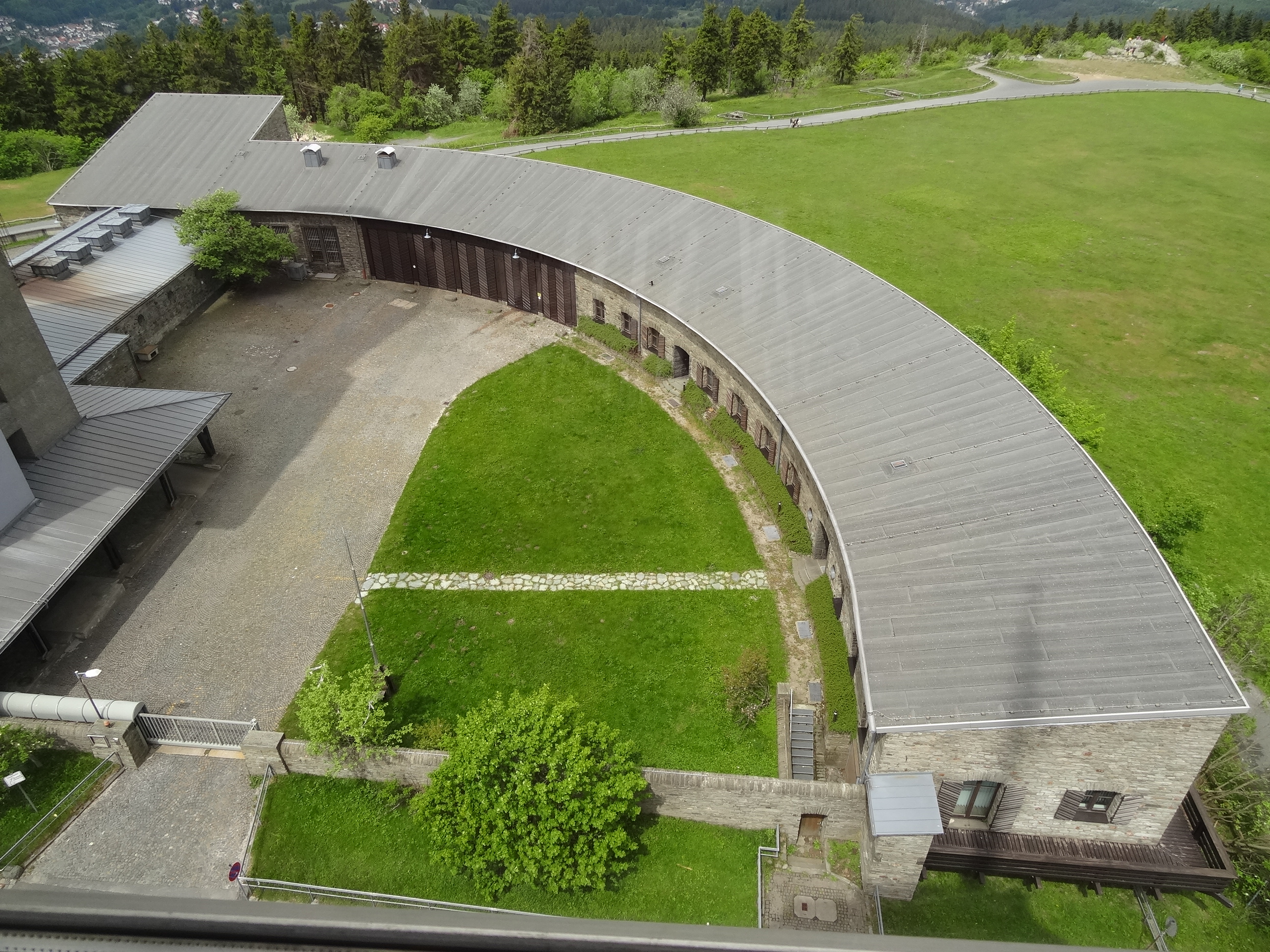 Großer Feldberg